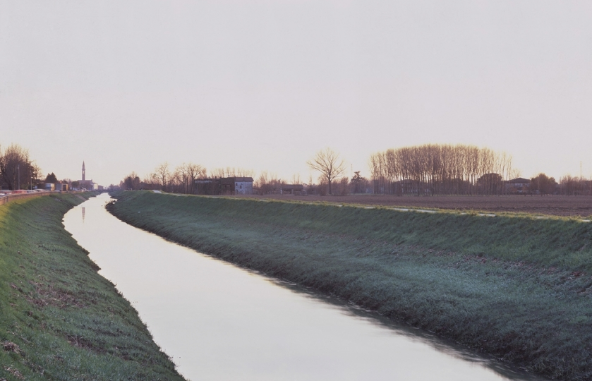 Il fiume Muson dei Sassi fotografato nei pressi di Loreggia.